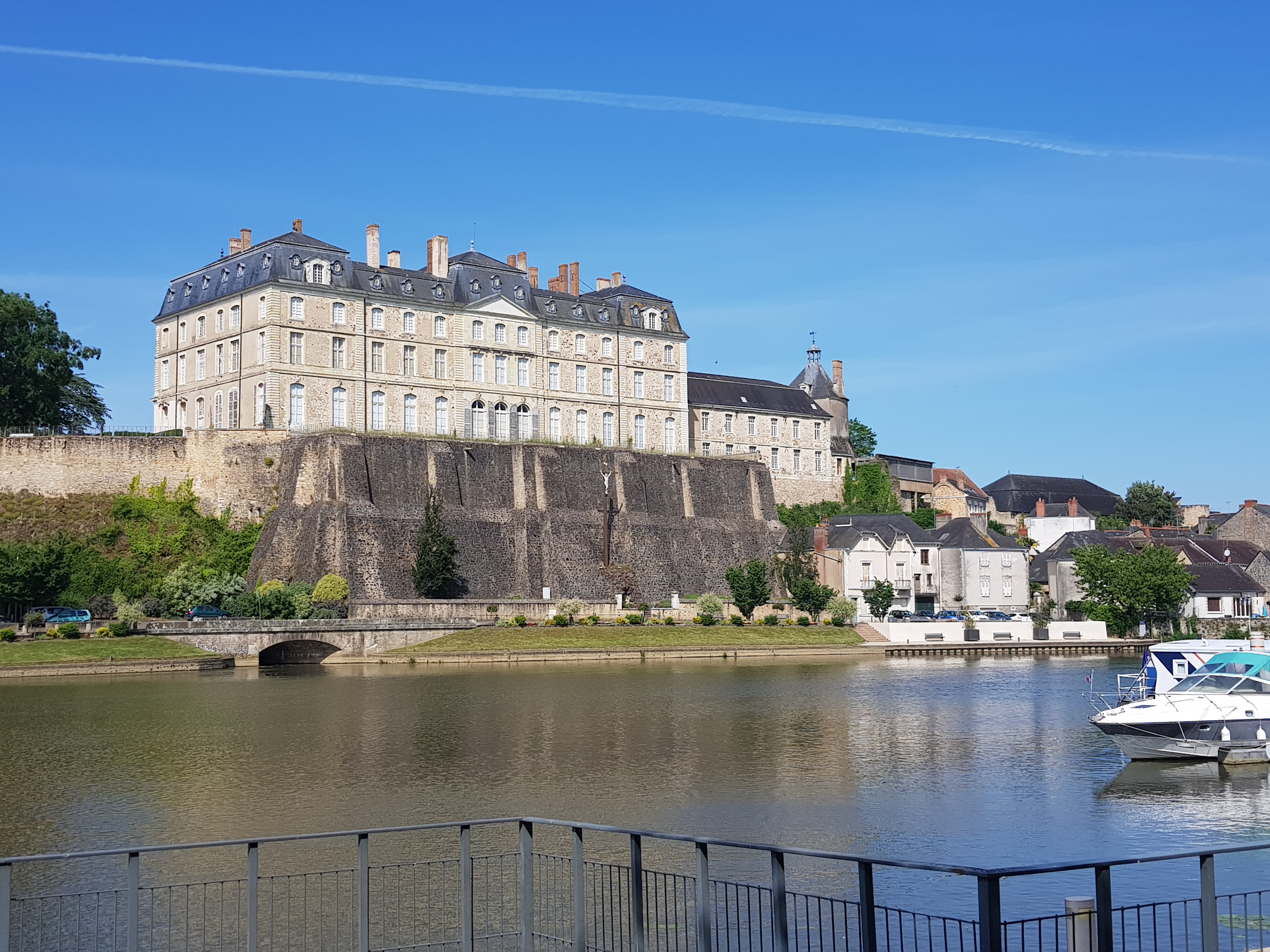 Le château de Sablé en 2018. .